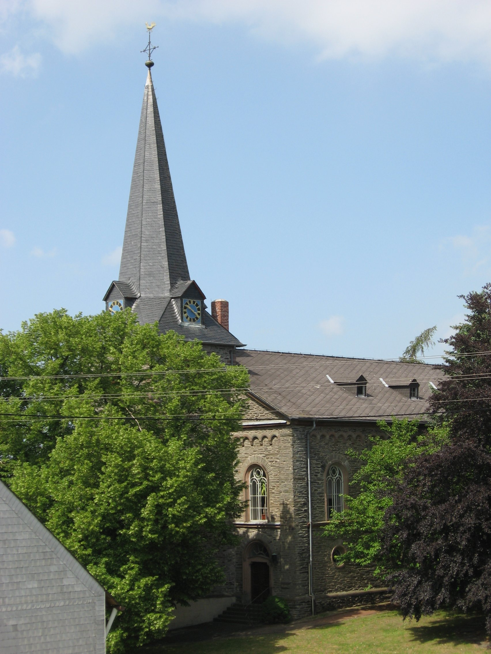 Evangelische Kirche in Irmenach, erbaut 1871/72.